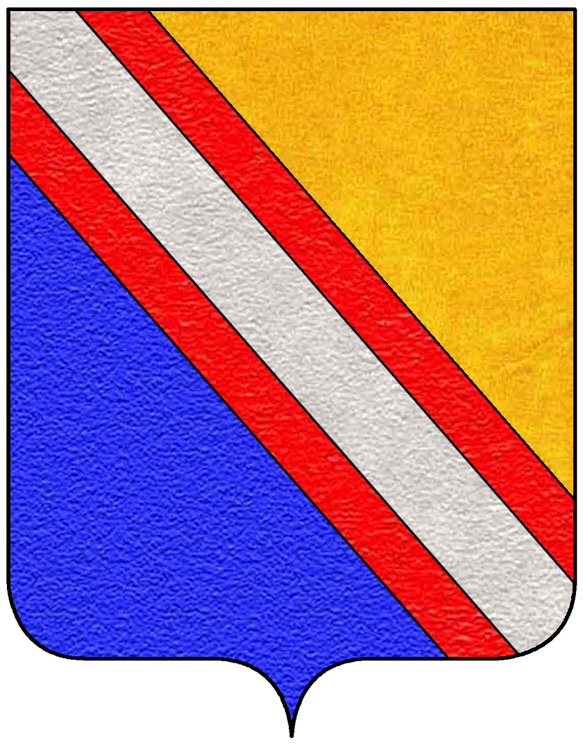 Stemma della famiglia Bollani, appartenente al patriziato veneziano.